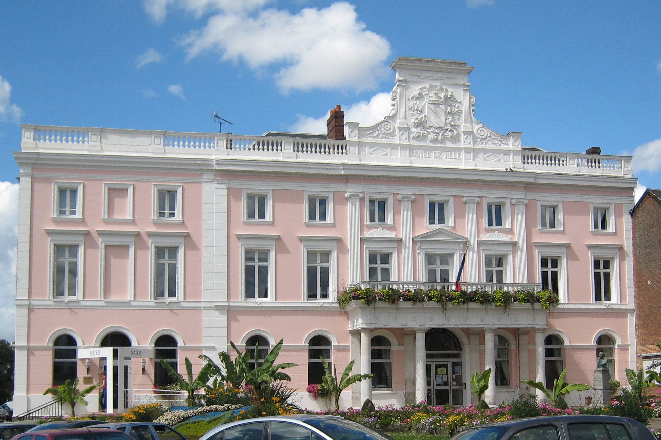 Hotel de Ville du Neubourg, Eure, France